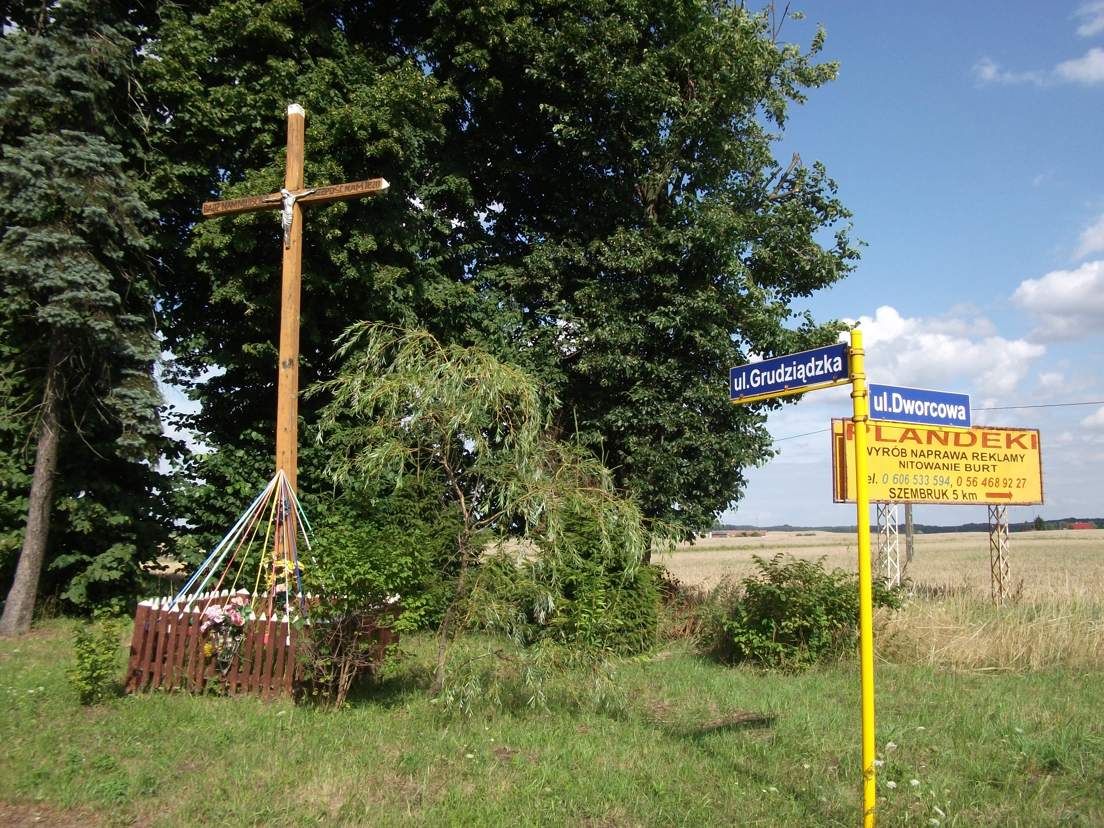 Gardeja II koło PKP Gardeja